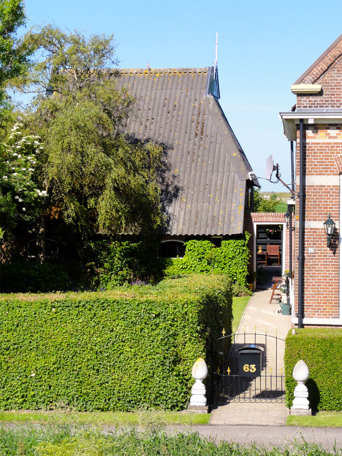 Schuringaweg 63 in Sint-Annaparochie